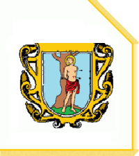 Bandeira do senado da câmara da cidade do Rio de Janeiro, no período colonial e real. Tendo sido utilizada na recepção da chegada da família Real em 1808 É uma bandeira seada branca, com franjas e galões de ouro, tendo dentro de um escudo em estilo barroco, bordado à ouro, prata e seda amarela e vermelha,a imagem de São Sebastião, pintada à óleo Essa é uma bandeira que como outras de sua época, eram bandeiras do Senado da Câmara, um equivalente à Câmara de Vereadores, ao qual era instalada juntamente com a criação de vilas e cidades, seguindo as orientações contidas nas Ordenações Manuelinas e Filipinas, era um órgão consultivo, legislativo e judiciário. Atuava como representante dos interesses da população, de sua composição faziam parte os “homens de bem”, isto é, pertencentes à nobreza, ao clero e à milícia, sendo chamados de oficiais devido ao fato de cada membro possuir um encargo. Em 1831, o elmo foi retirado e usado até c. de 1889.